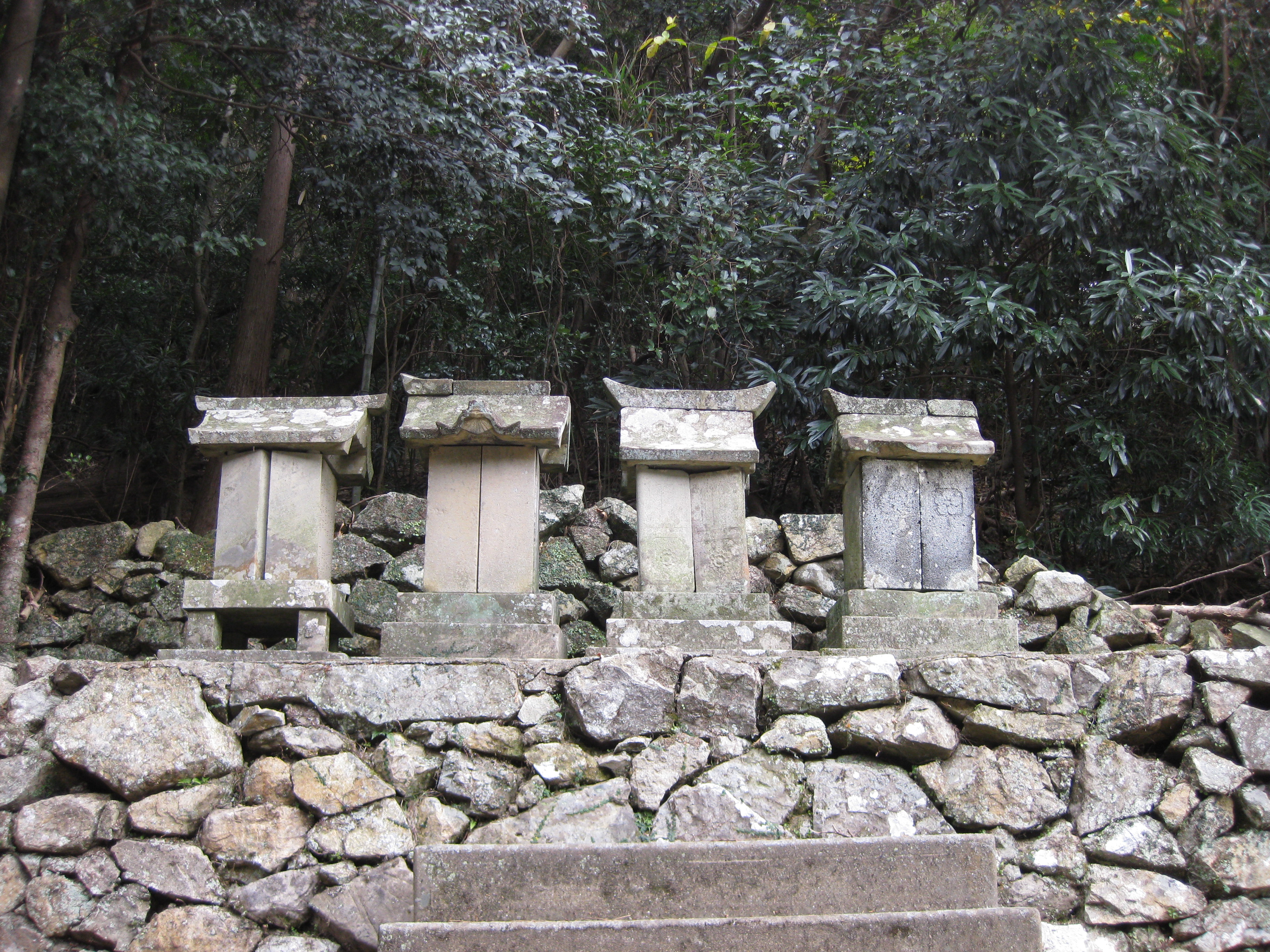 新上五島町 若松郷